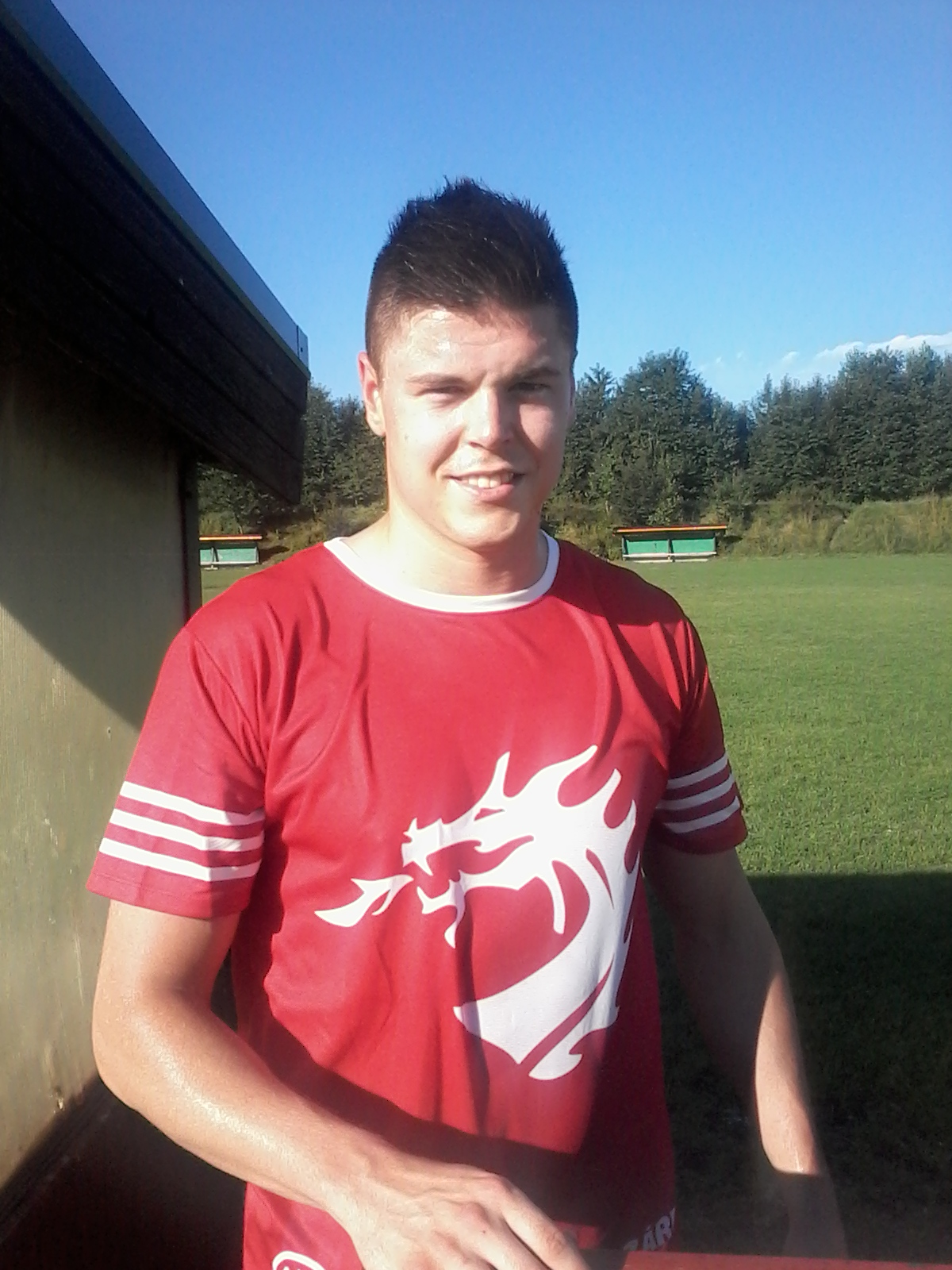 Aron Chmielewski - 2.8.2016 v areálu bystřického fotbalového hřiště - přátelské utkání mezi výběrem HC Ocelářů Třinec a Fanklubu